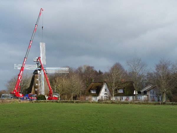 Valentinstag 2020 - die Graupenmühle Fortuna in Struckum bekommt neue Flügel, (rechts ist das ehemalige Müllerhaus zu sehen)